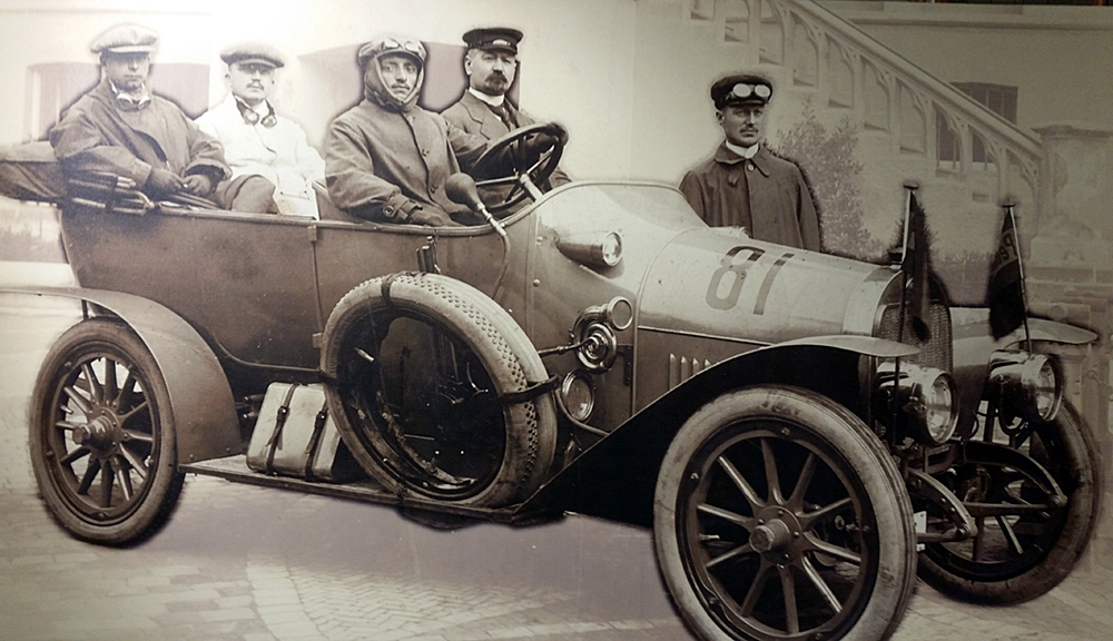 im Miele-Museum